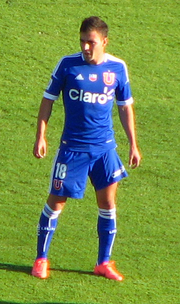 Luis Felipe Gallegos con la camiseta de la U de Chile en el partido que enfrentó a su club con el Coco Colo el 29 de abril de 2012 en el Estadio Nacional de Chile.